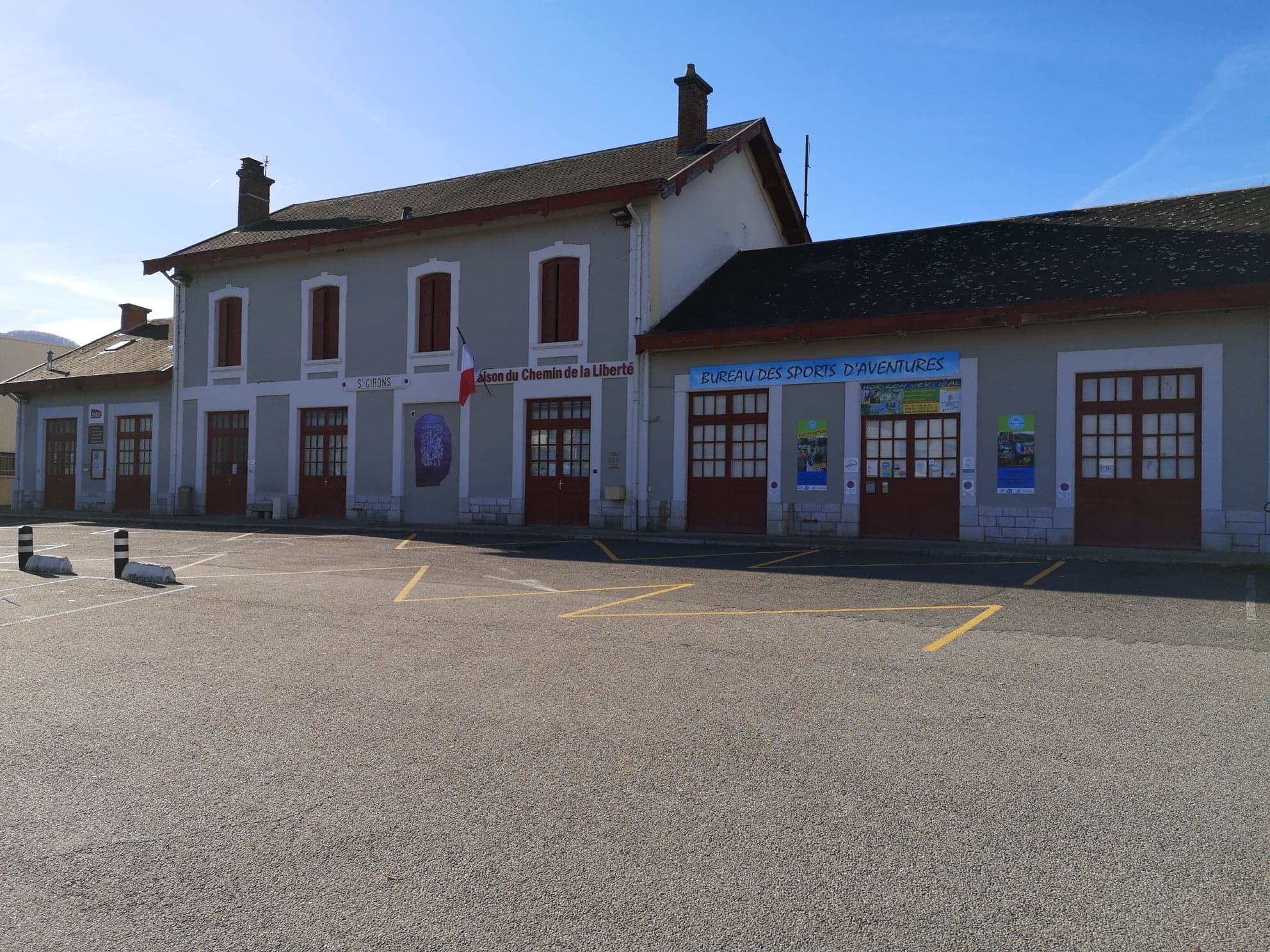 Ancienne gare de Saint-Girons (Ariège) reconvertie, avec sur la gauche l'espace multimodal communal permettant la délivrance de billets de transports.